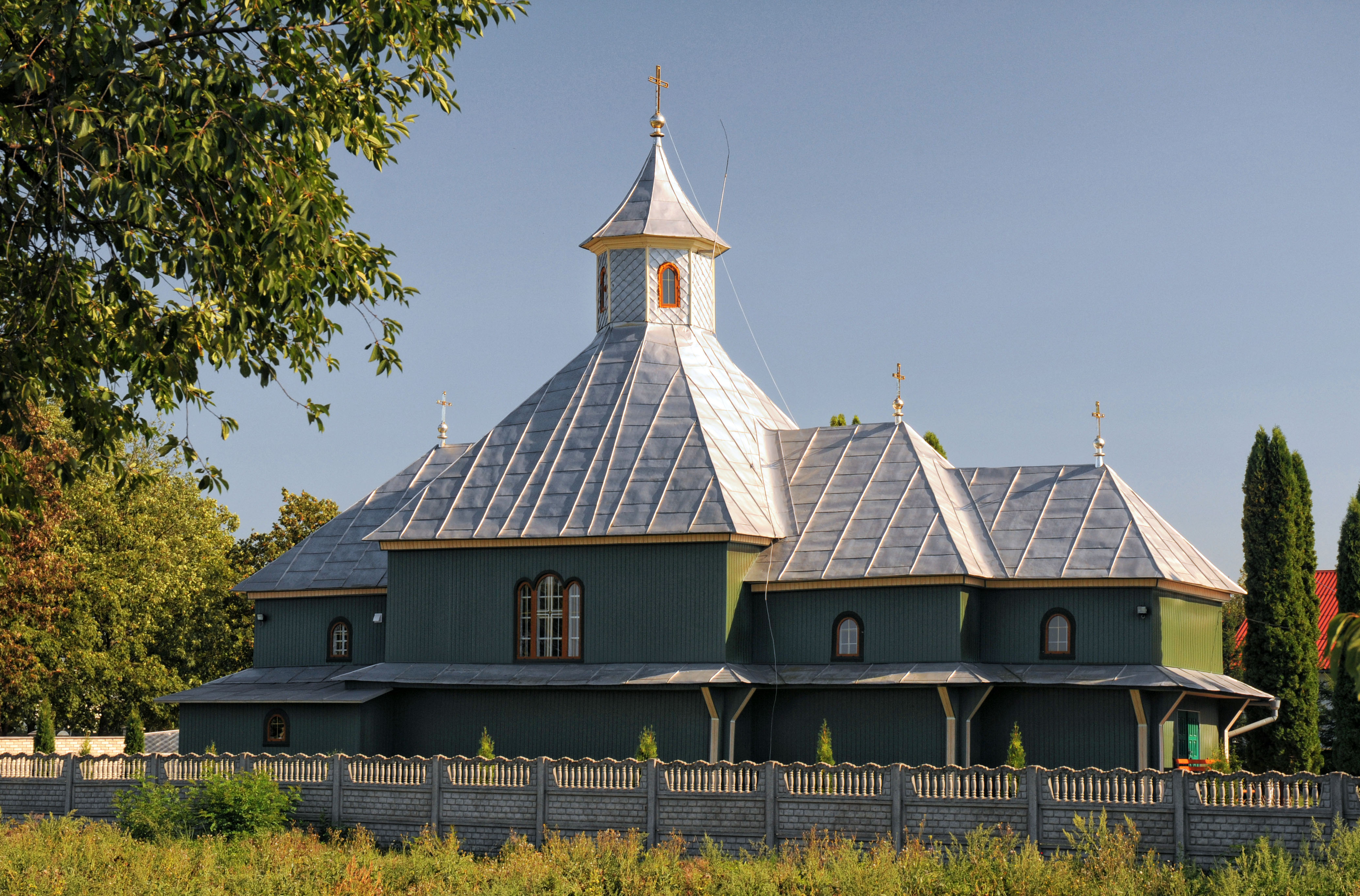 Мамаївці, Іванівська церква